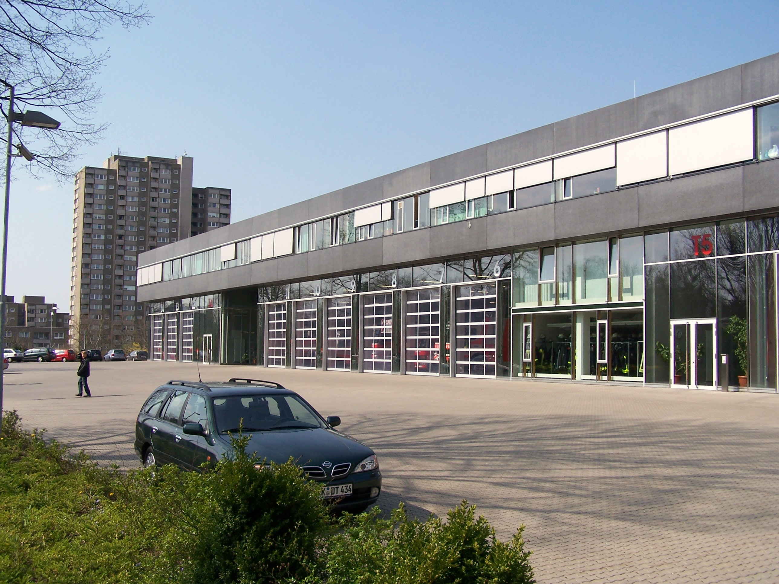 Südseite (Marbachweg) der Bereichsleitungswache 1 im BKRZ mit Fahrzeughallen für Feuerwehr (rechts) und Rettungsdienst (links)